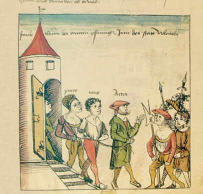 Die Gefangenen werden aus dem Faulturm geführt. Volkacher Salbuch folio 388r